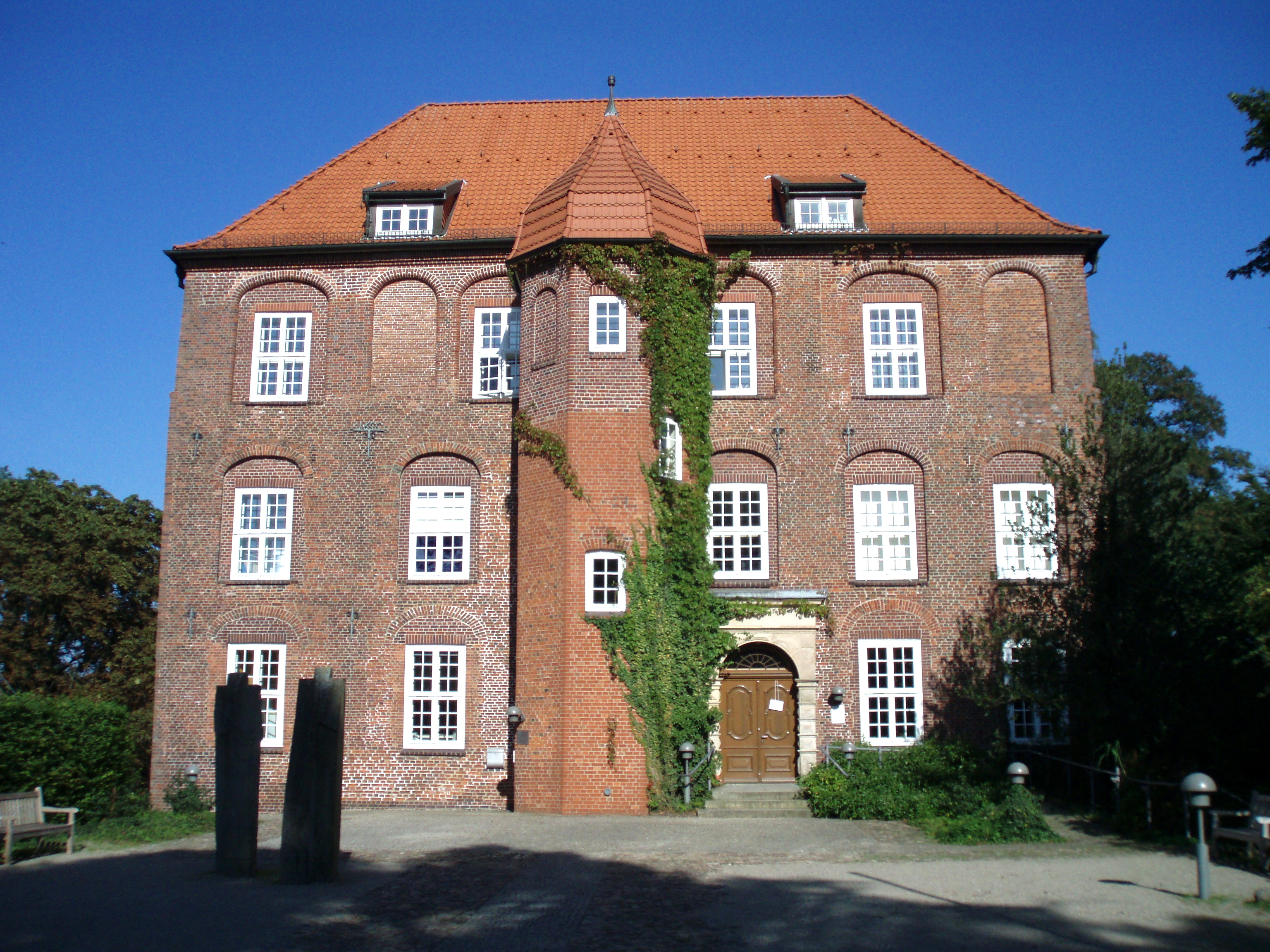 Agathenburg Castle